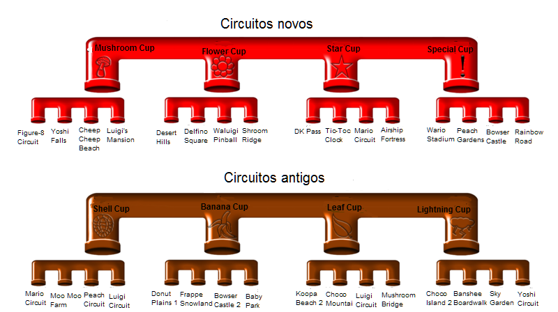 Esquema com os circuitos disponíveis em Mario Kart DS.